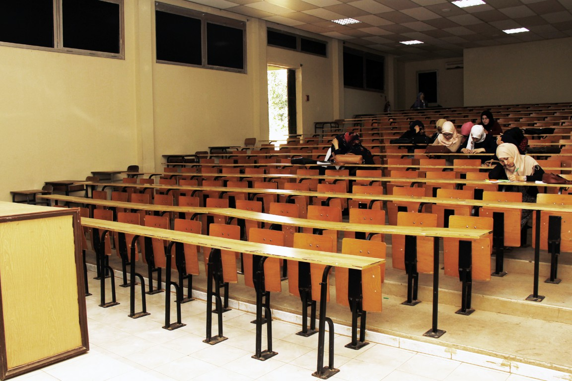 Amphithéâtre